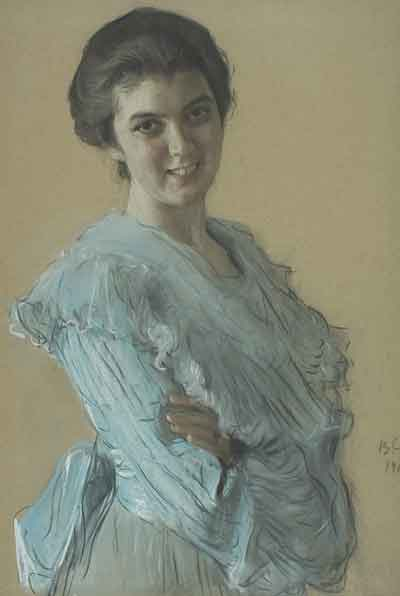 В. Серов. Портрет Нины Серовой. 1903. ГТГ. Бумага, пастель. Н.К. Хрущева, дочь профессора Харьковского университета К.Д. Хрущева (1852-1912)